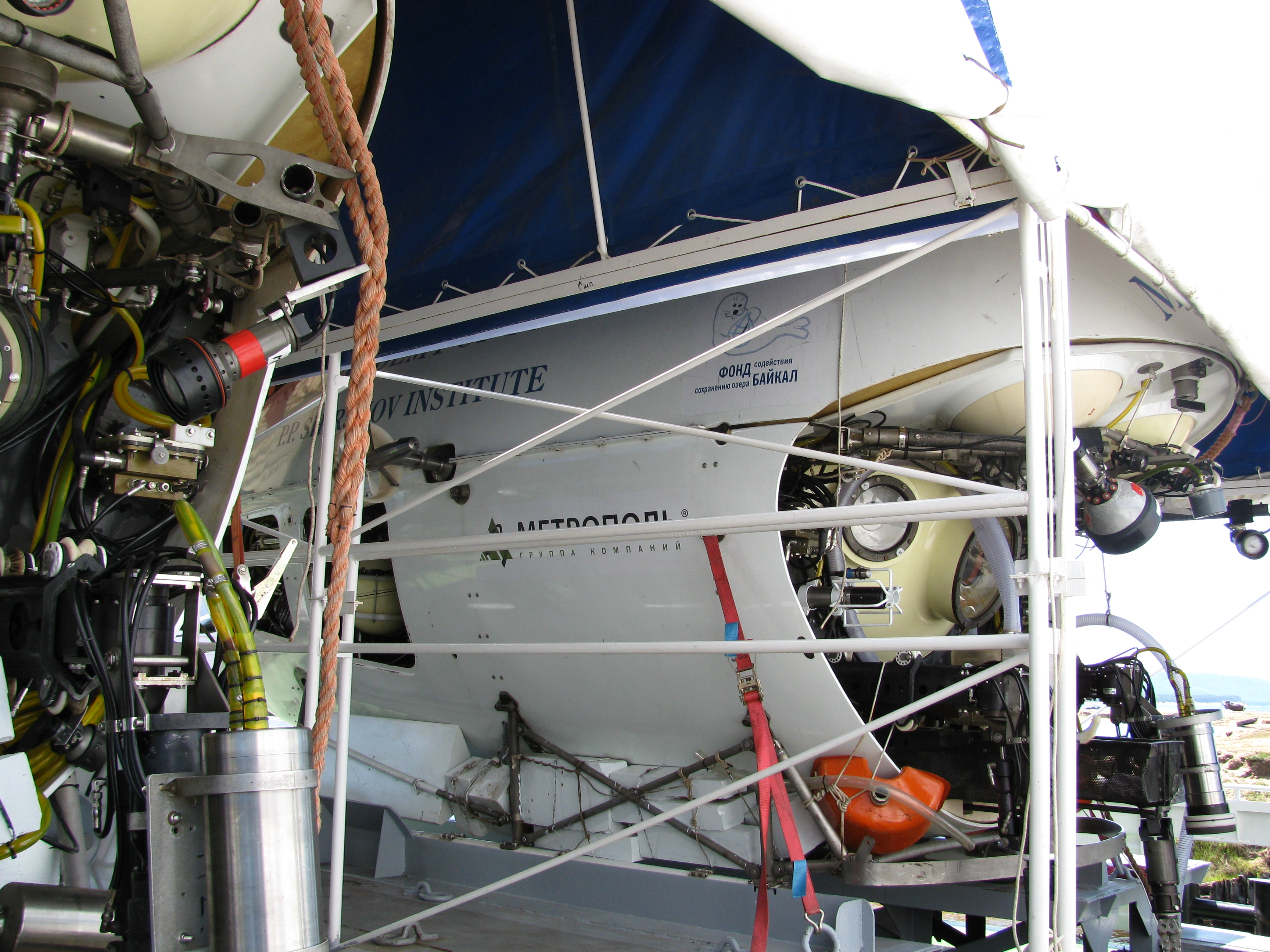 Глубоководные обитаемые аппараты МИР-1 и МИР-2 на барже в порту села Турка на озере Байкал.